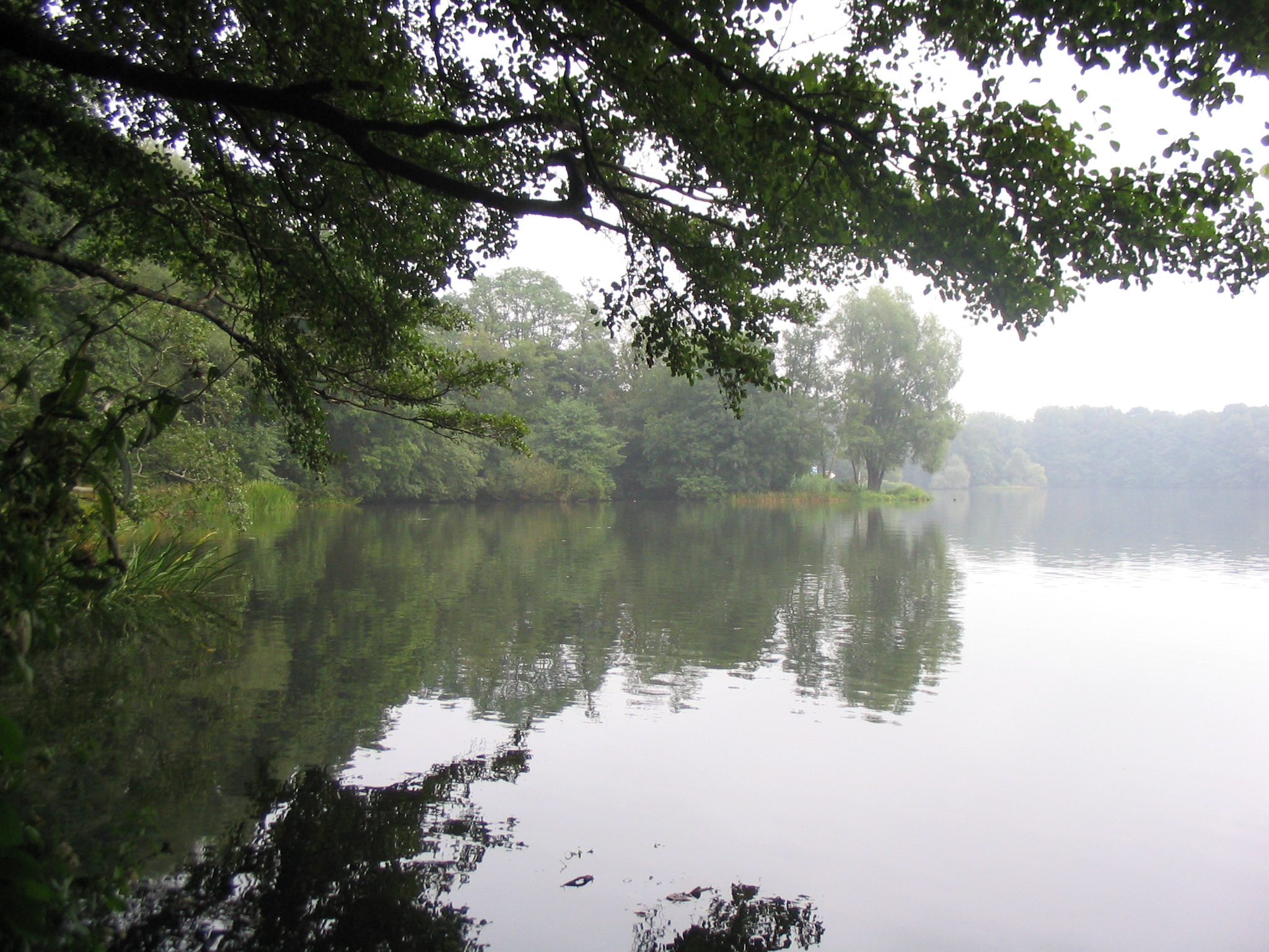 nördlicher Bereich des westlichen Ufers